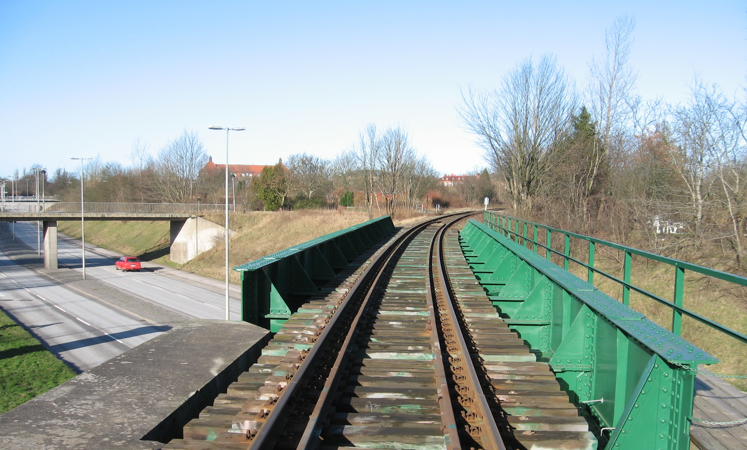 Järnvägsbro i Lund. En nitad stålbalkbro uppförd 1936 för Lund-Trelleborgs järnvägs räkning som går över Ringvägen, mellan Stadsparken och Klostergården.